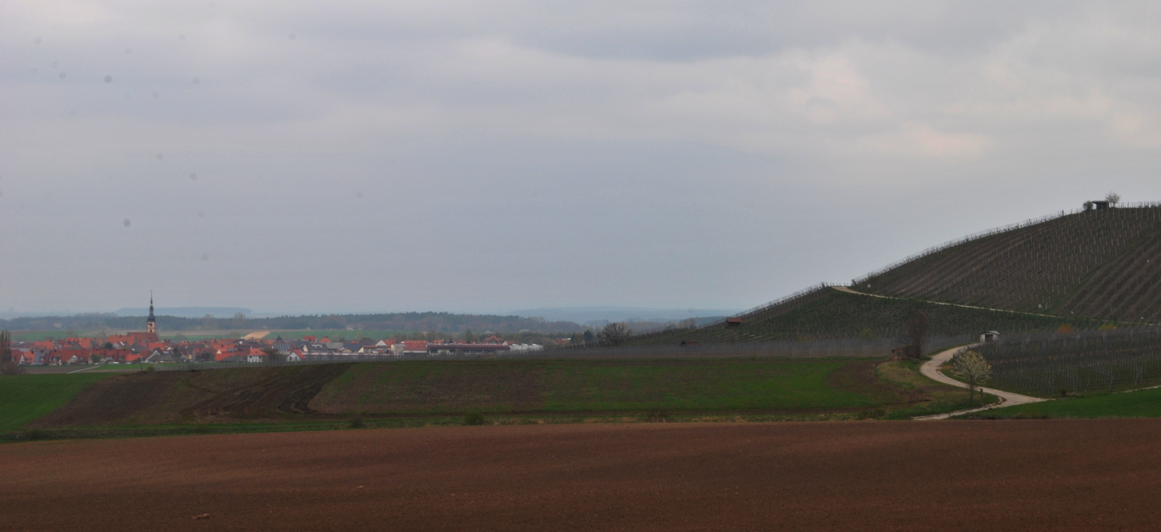 Abtswind mit Schildsberg